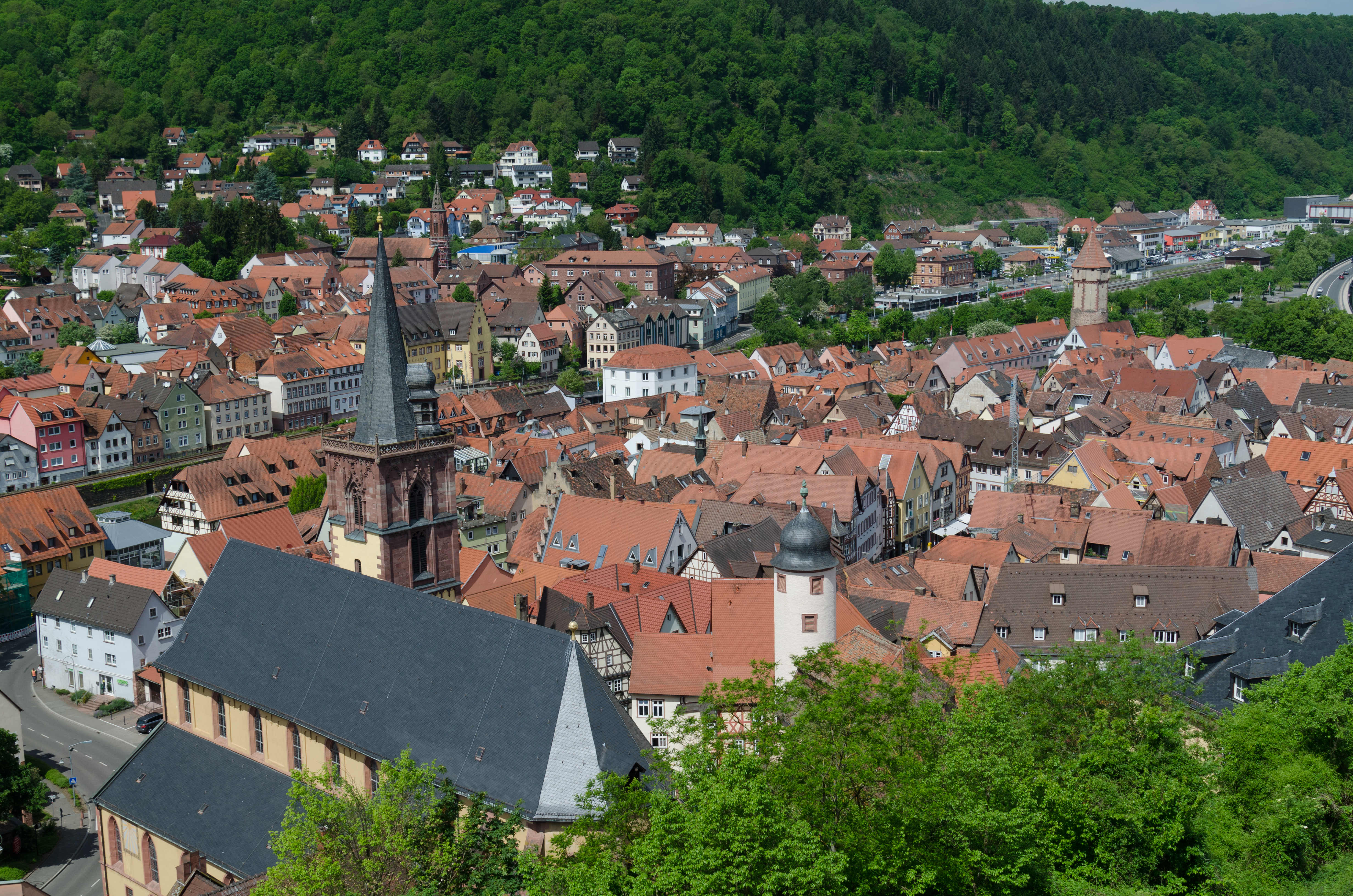 Wertheim, Blick von der Burg auf die nördliche Altstadt